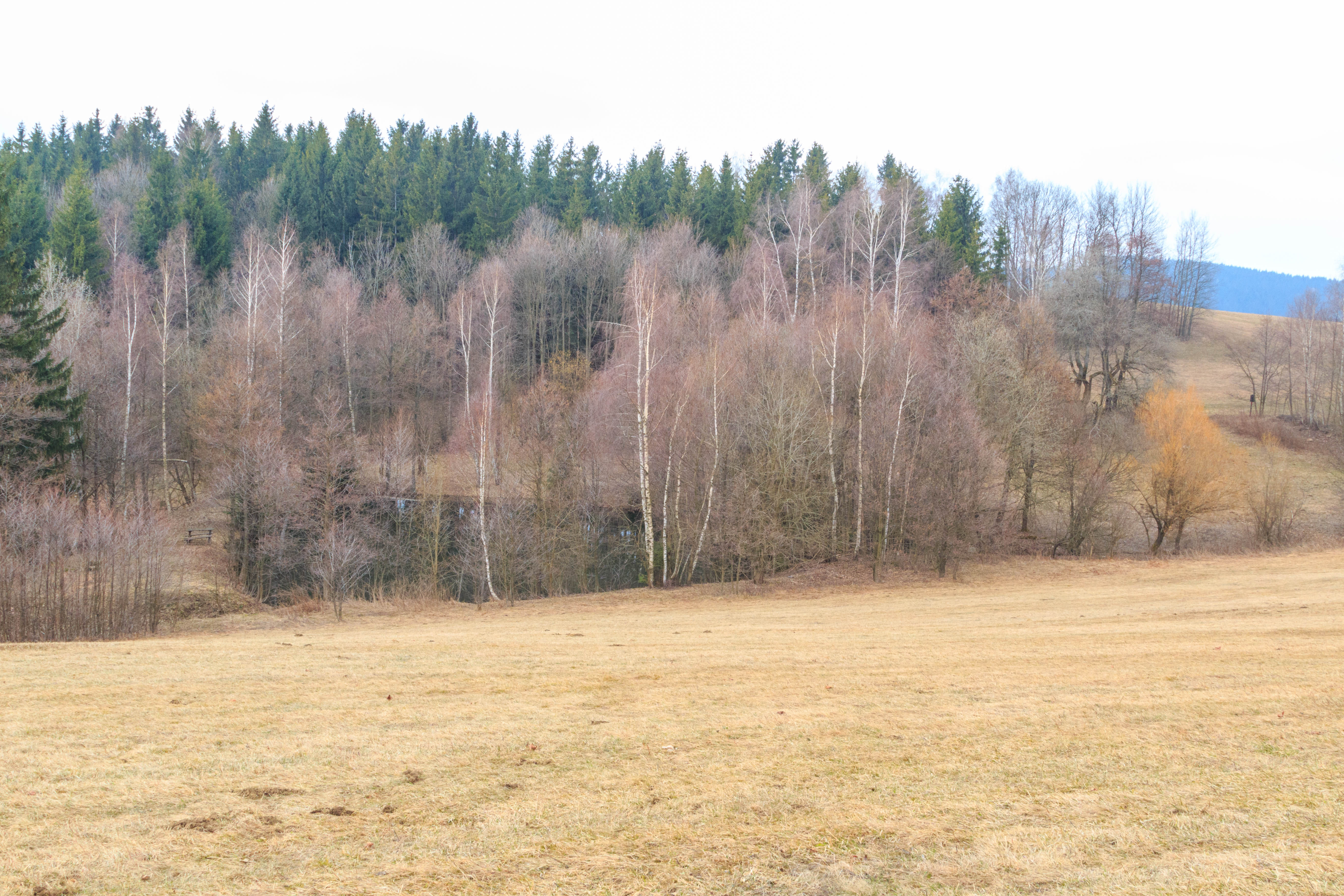 Přírodní památka Kačerov Project: Chráněná území.